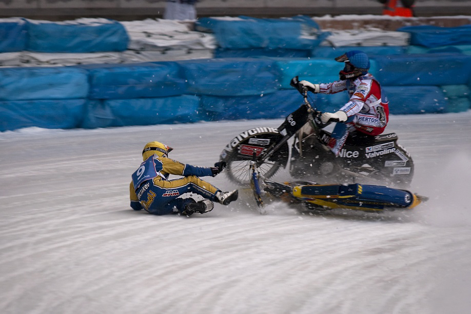 Финал личного чемпионата Европы по мотогонкам на льду. Тольятти. Россия